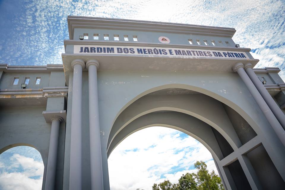 Jardim dos Heróis, Same